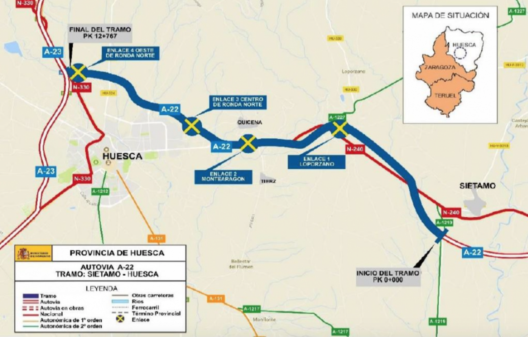 Mapa del trazado de la autovía A-22 en el tramo Siétamo-Huesca.